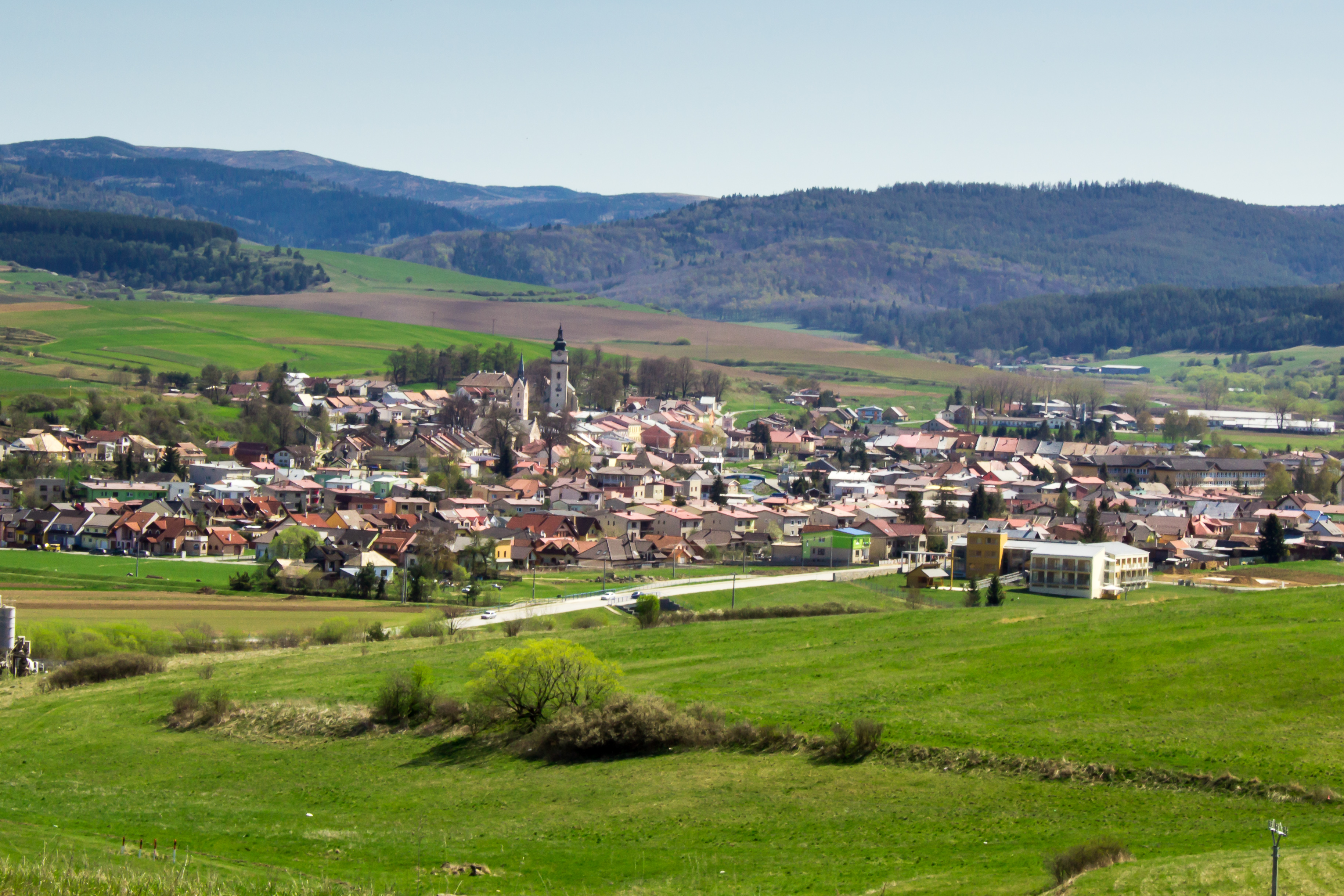 Pohľad na obec Ľubica